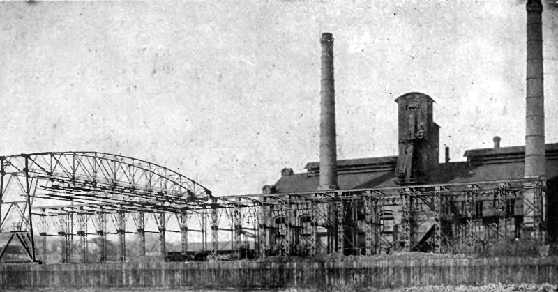 Kolejka wisząca na terenie gazowni bydgoskiej